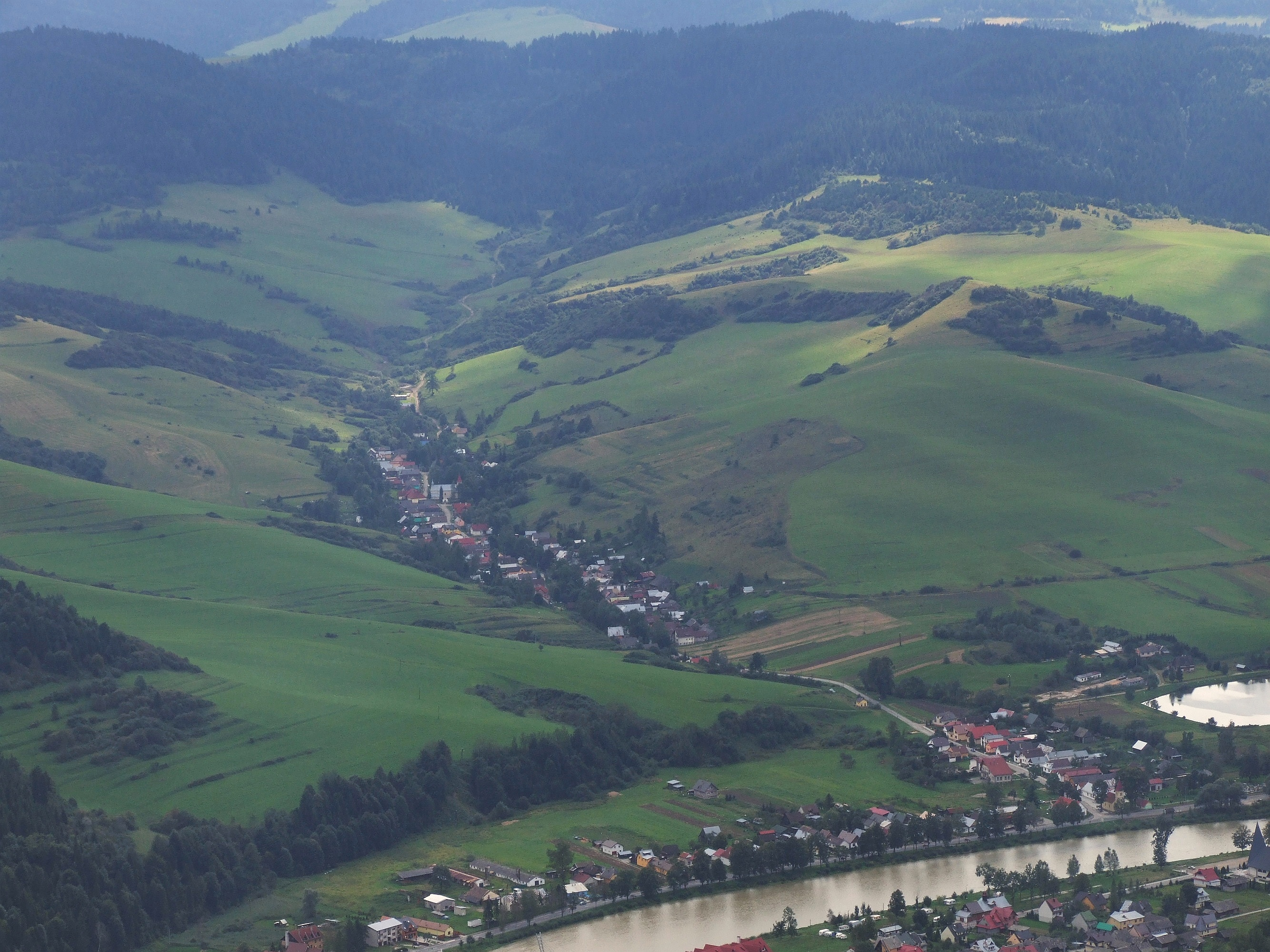 Widok z Trzech Koron